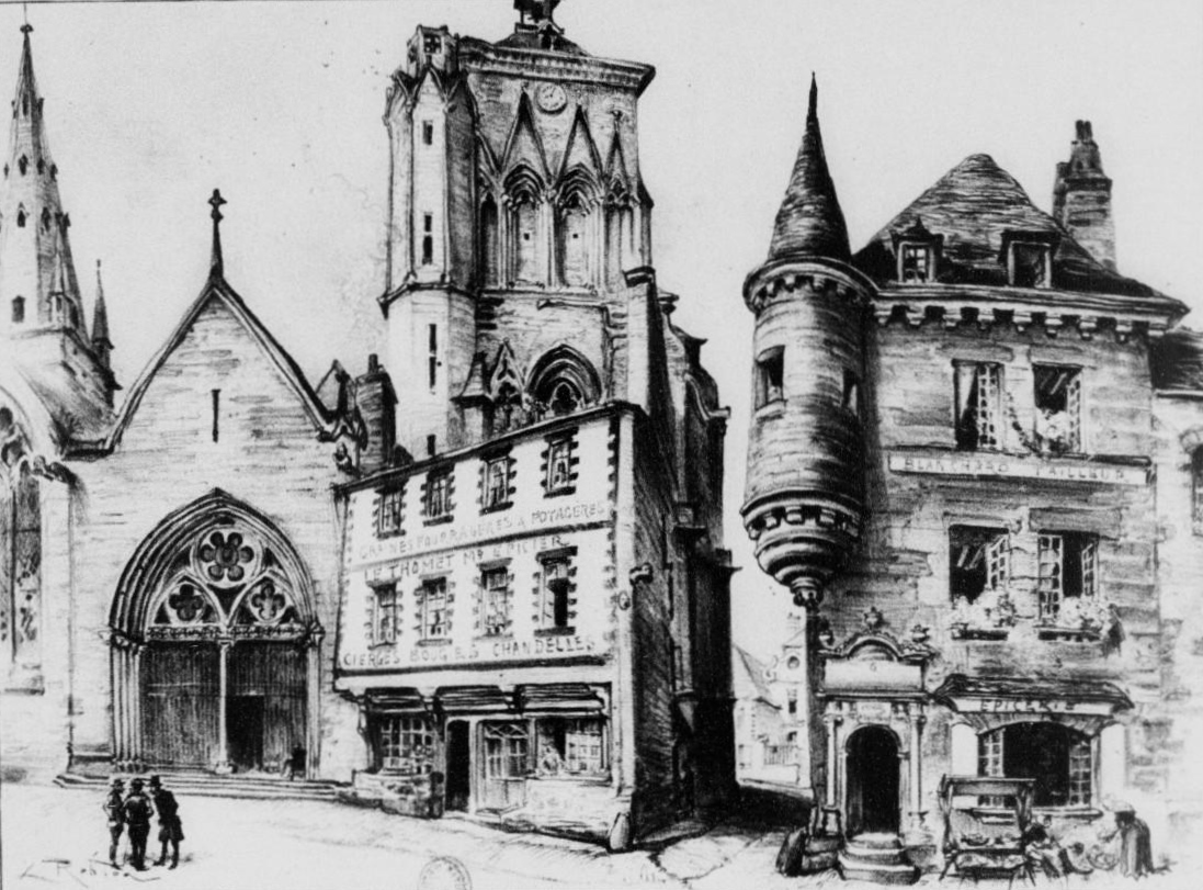 Guingamp : la Grande Rue vers 1900 (lithographie d'Albert Robida publié dans "La vieille France, Bretagne" vers 1900)